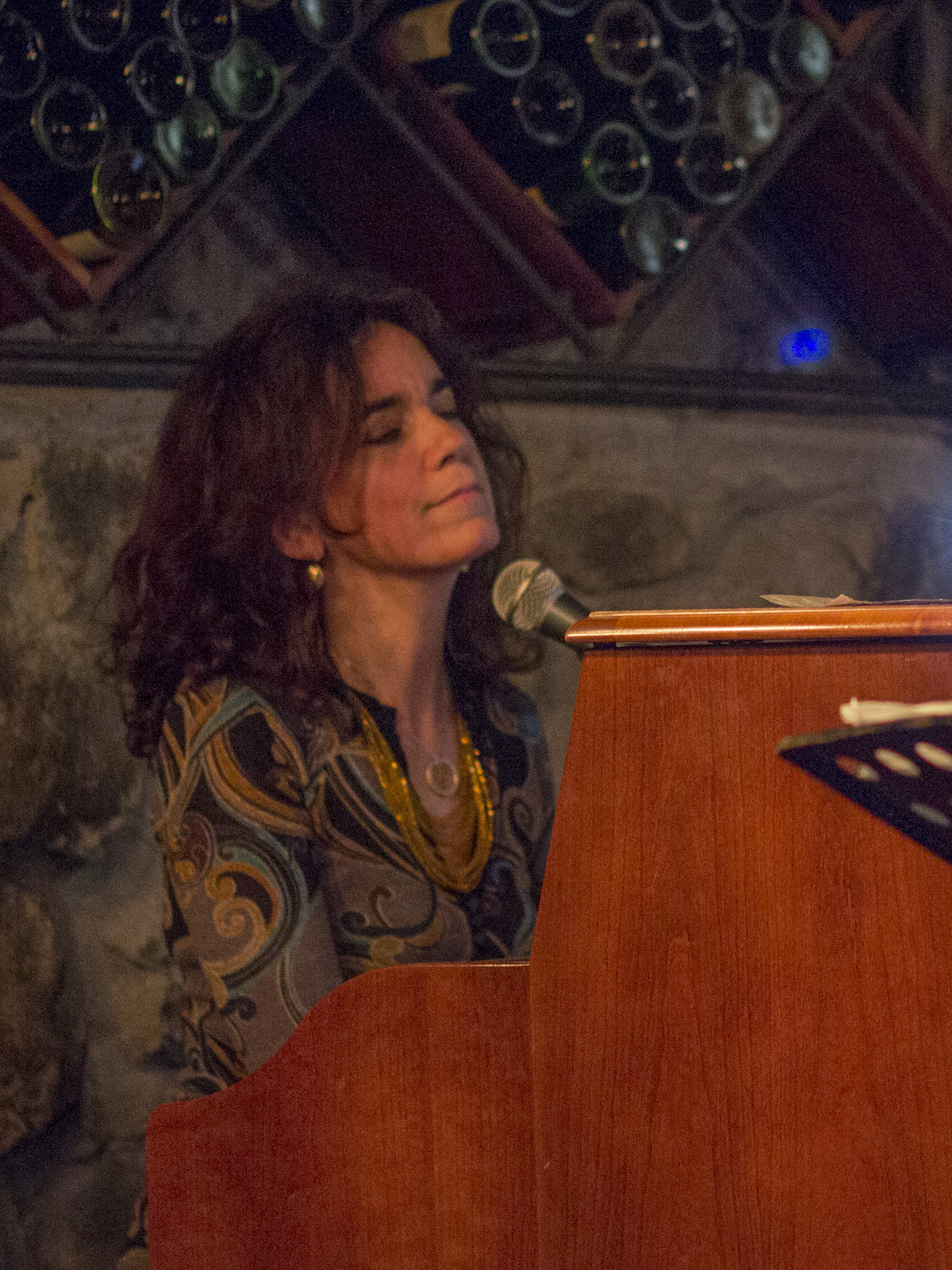 Catalina Claro durante una presentación en el restaurante "El Mesón Nerudiano" en Santiago de Chile.